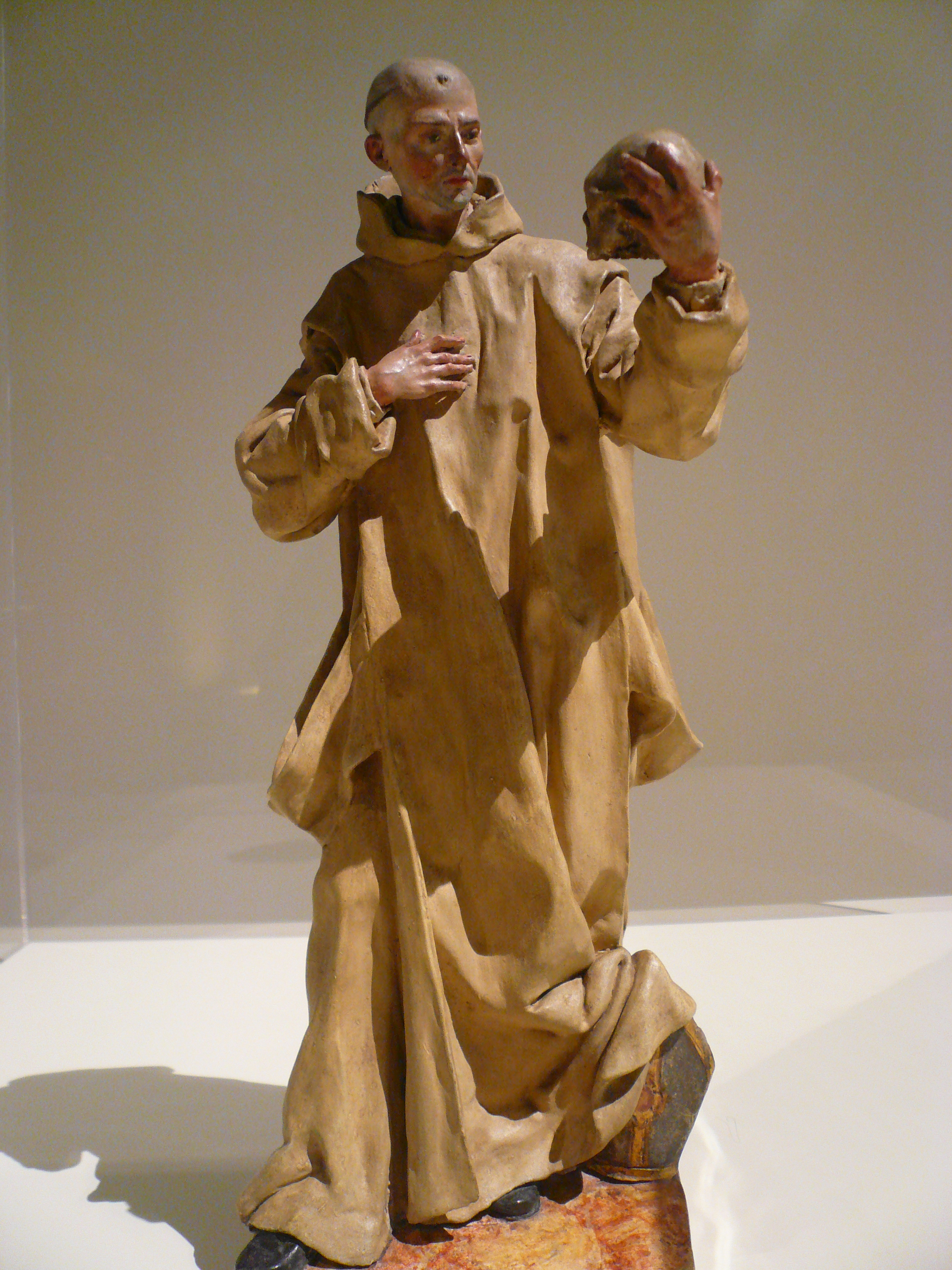 Palau Nacional. Museu Nacional d'Art de Catalunya. Mirador del Palau Nacional, 6 (Barcelona). Object location41° 22′ 06″ N, 2° 09′ 12″ E